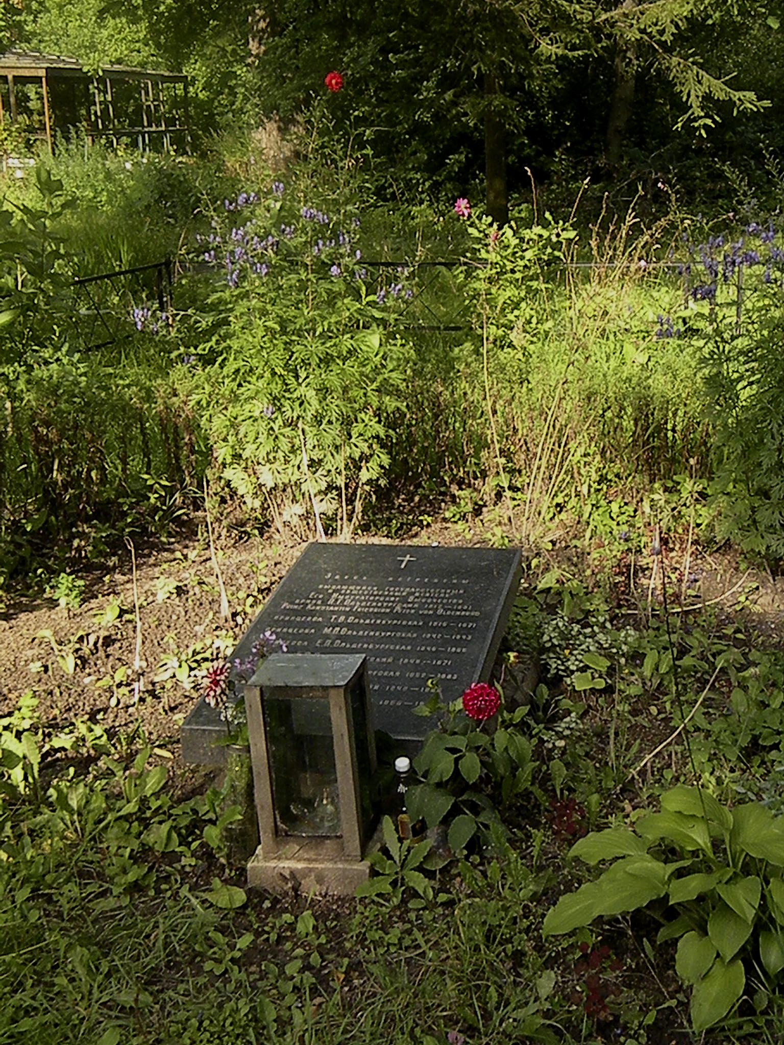 Остатки фамильного захоронения герцогов Ольденбургских.Свято-Троицкая Приморская пустынь